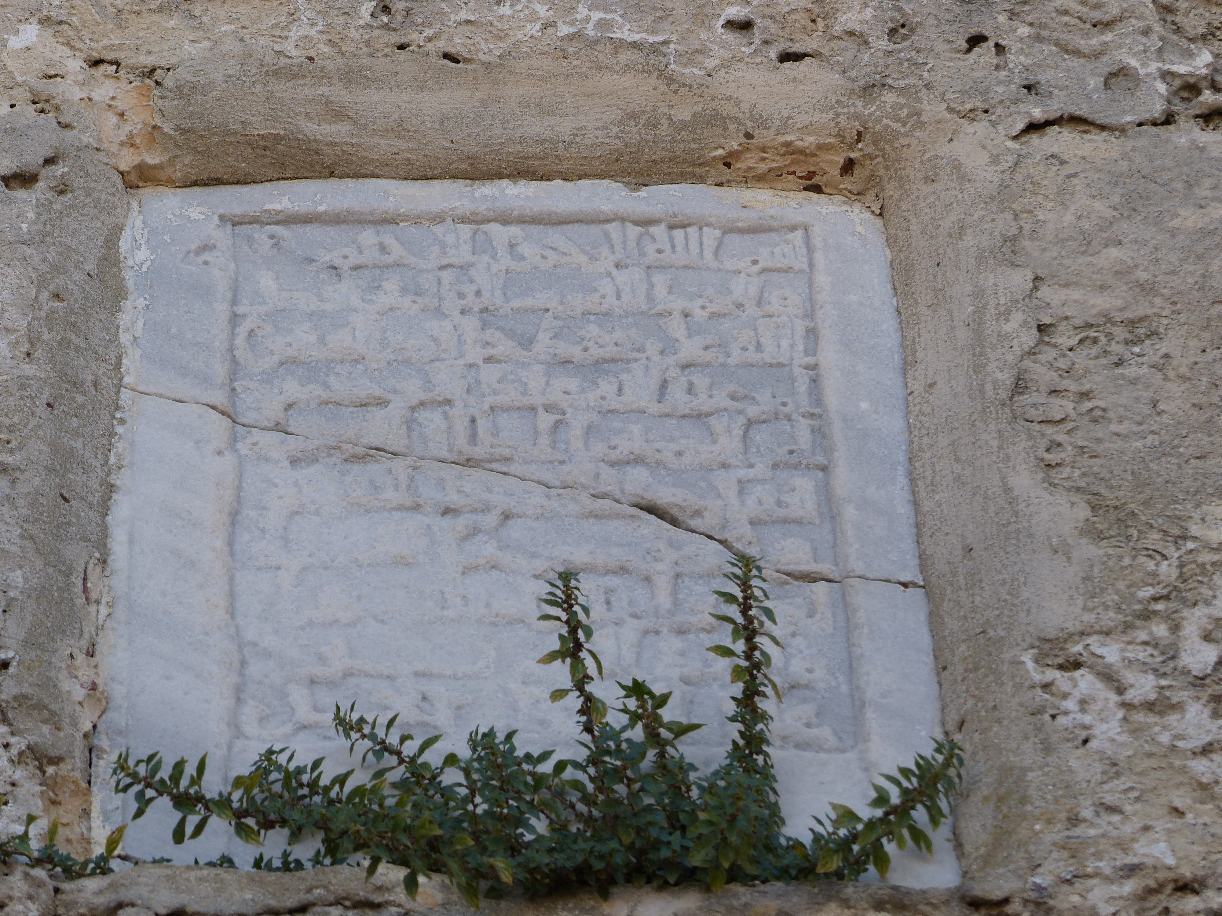 Placa árabe, Castillo de Tarifa, España, 2015